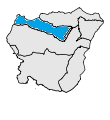 El terme de Font-rabiosa en el Capcir, realitzat a partir d'un mapa de lliure disposició